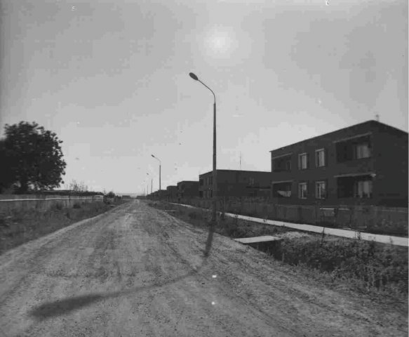 Село Октябрьский, Глазовский район Удмуртской республики. Улица Советская в 1987 году